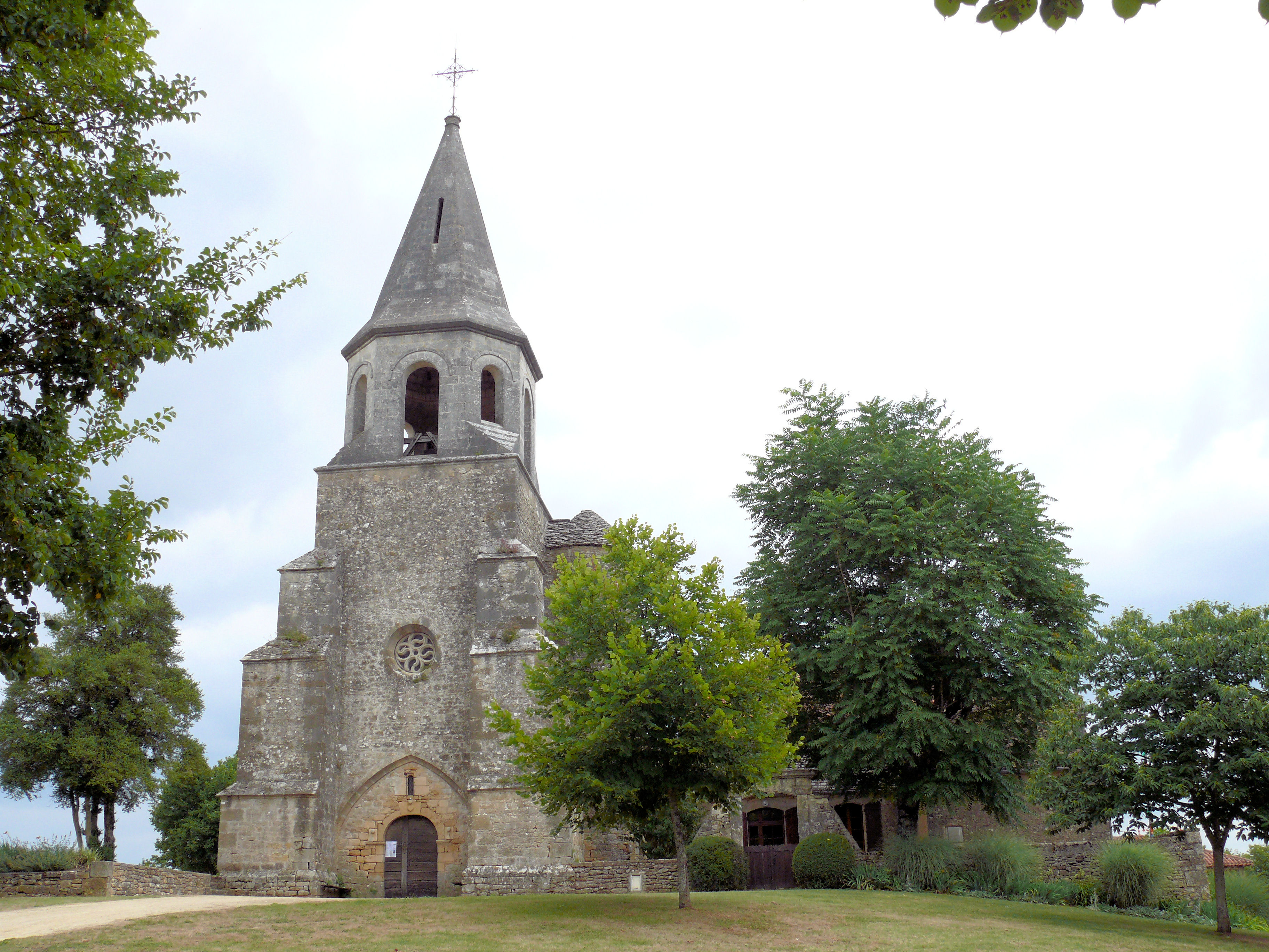 Loubejac - Eglise Saint-Pierre-ès-Liens - Clocher